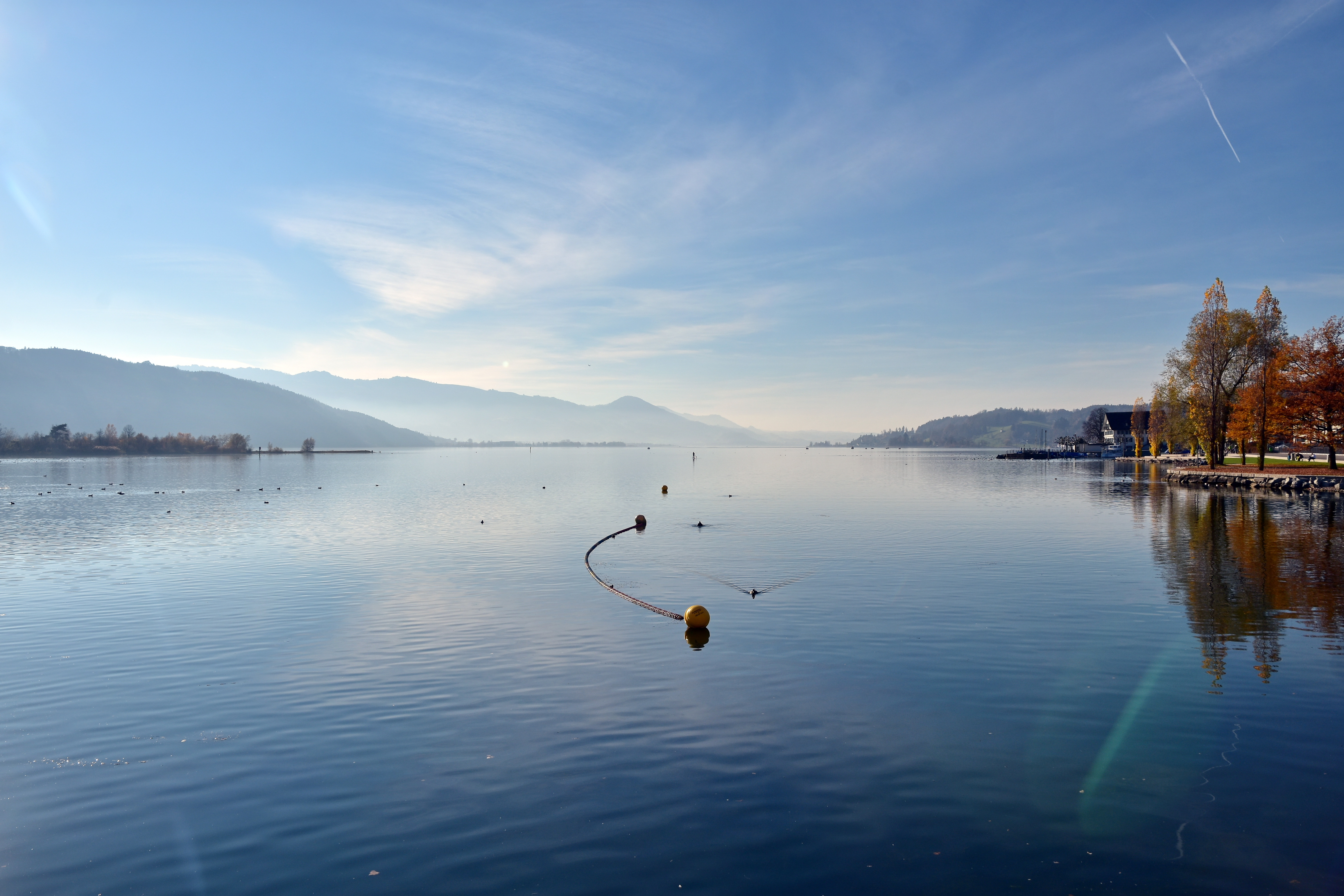 Schmerikon on Obersee lake shore (Switzerland)